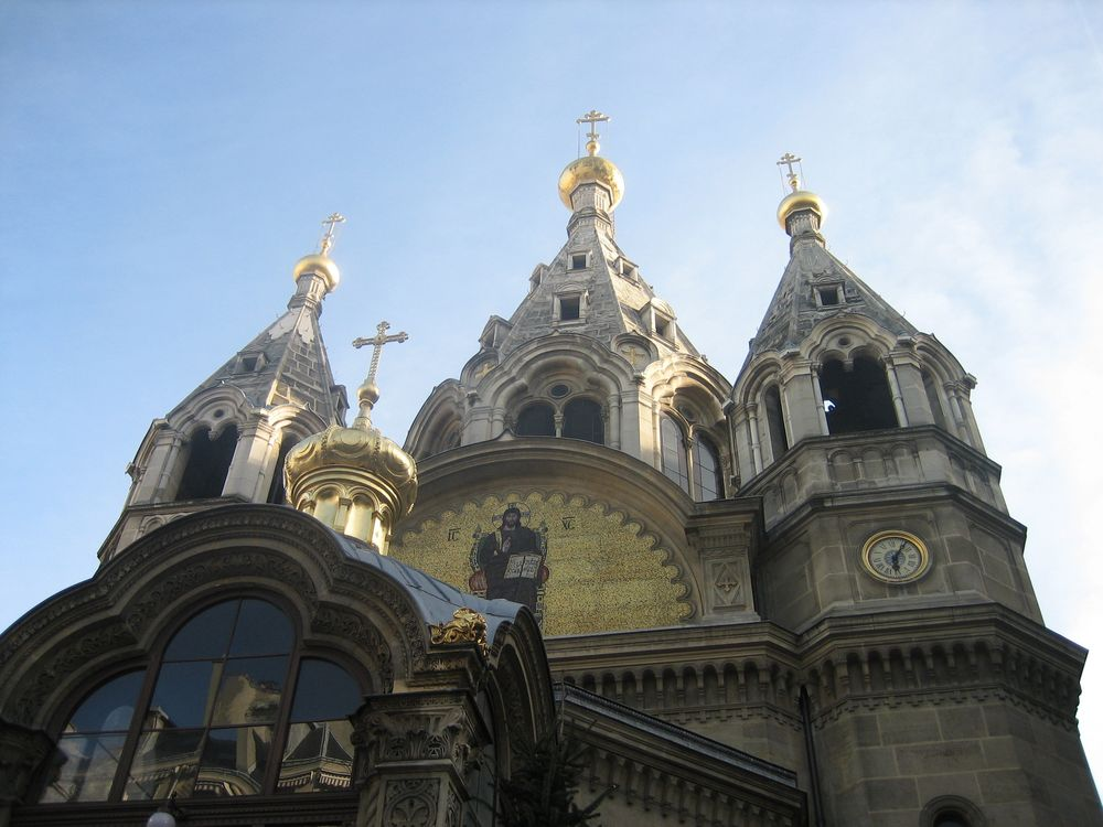 cathédrale orthodoxe Saint Alexandre Nevski - Paris